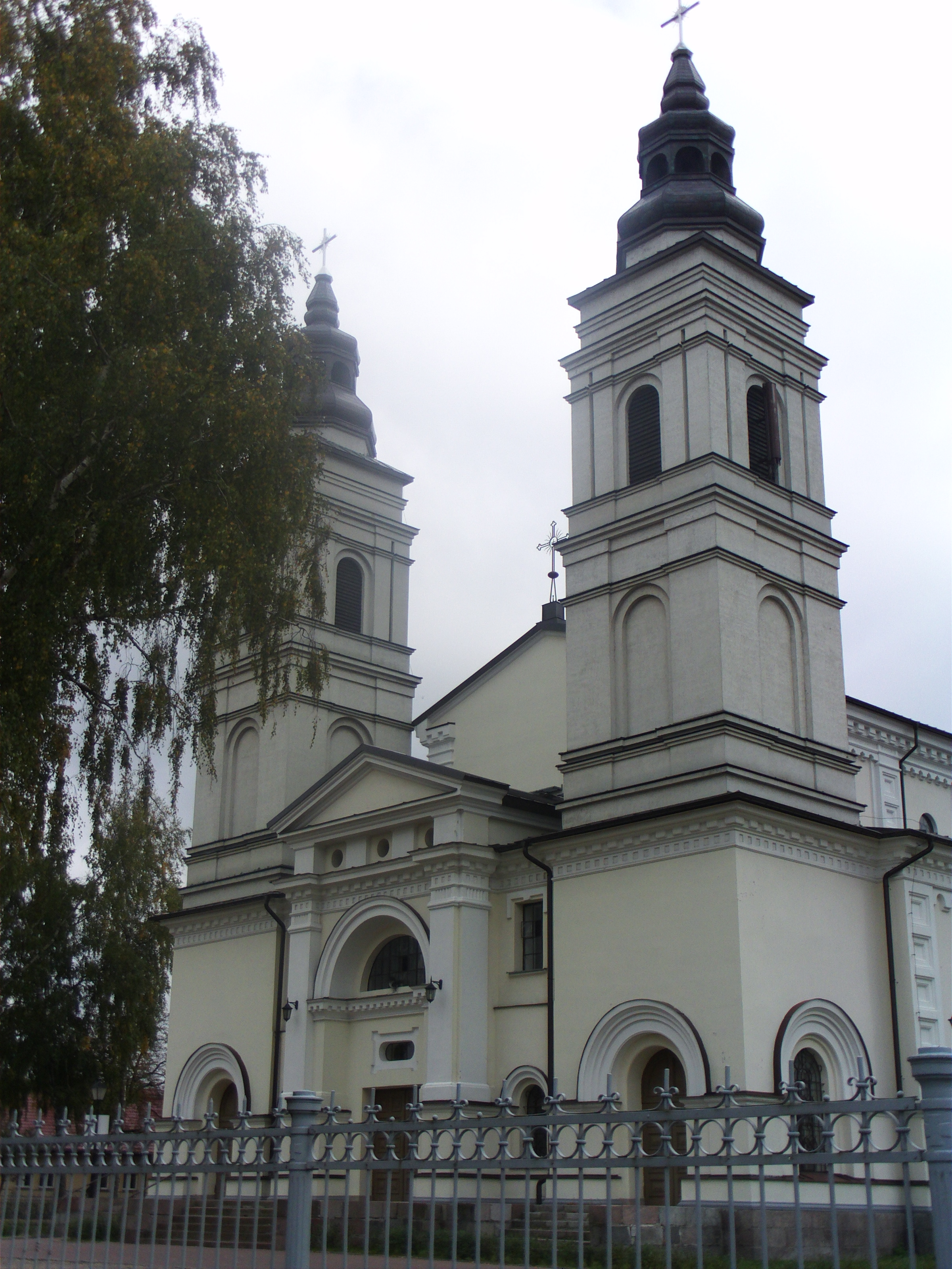 Suwałki. Cerkiew prawosławna, ob. kościół śś. Piotra i Pawła